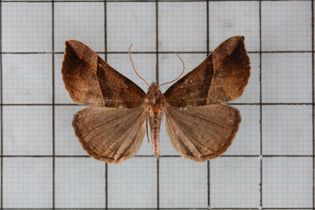 Hypospila bolinoides Guenee, 1852 鞍1:P.66,Pl.16-21